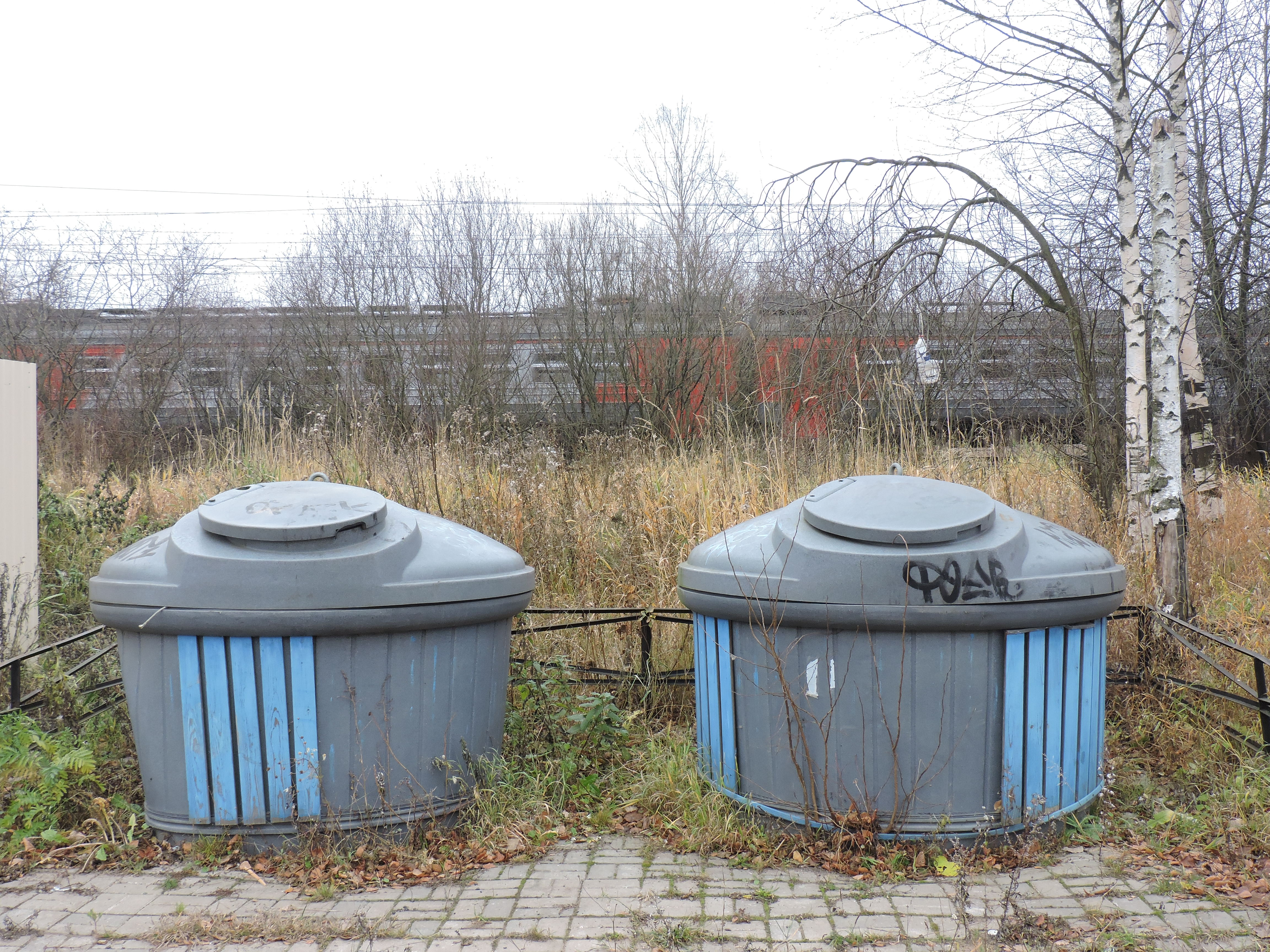 Мусорные контейнеры заглублённого типа на фоне проезжающей электрички